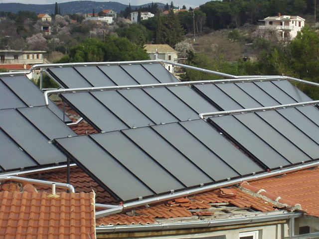 Solarni kolektor